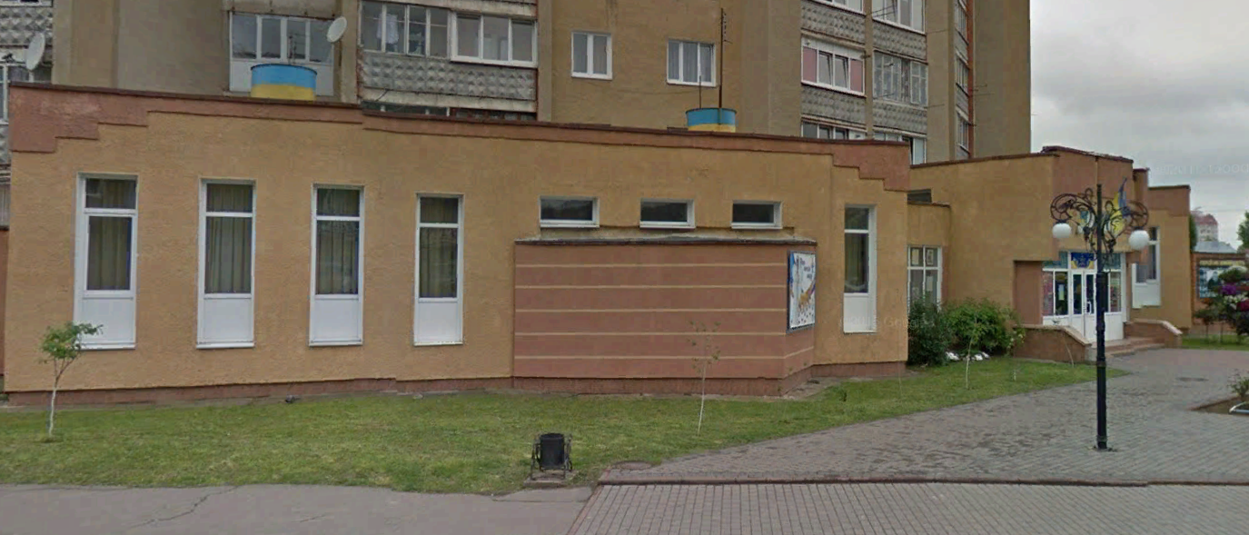 Центр художньої творчості дітей, юнацтва та молоді